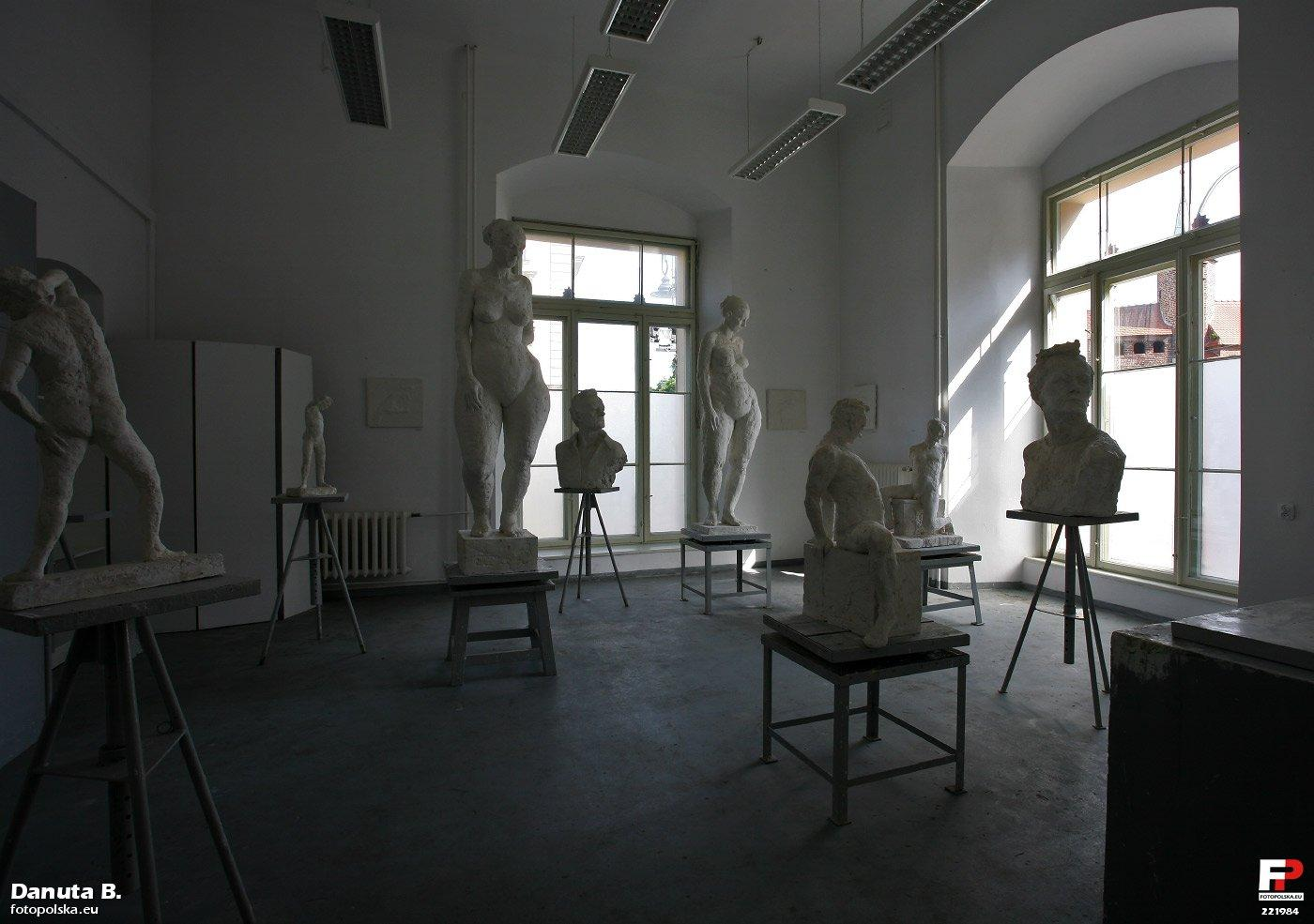 Gabinet rzeźby chyba na I piętrze.